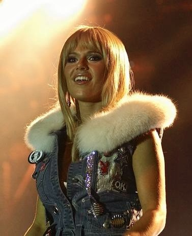 Doda